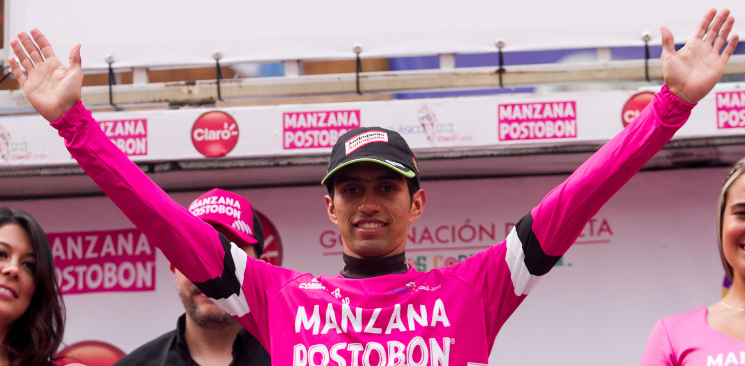 Cristhian Montoya Clásico RCN 2015 - Etapa 6